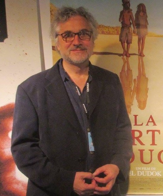 Michaël Dudok de Wit au festival international du film d'animation d'Annecy 2016